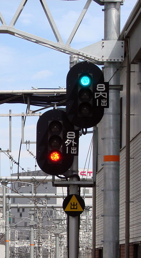 大阪駅８番線第１出発信号機